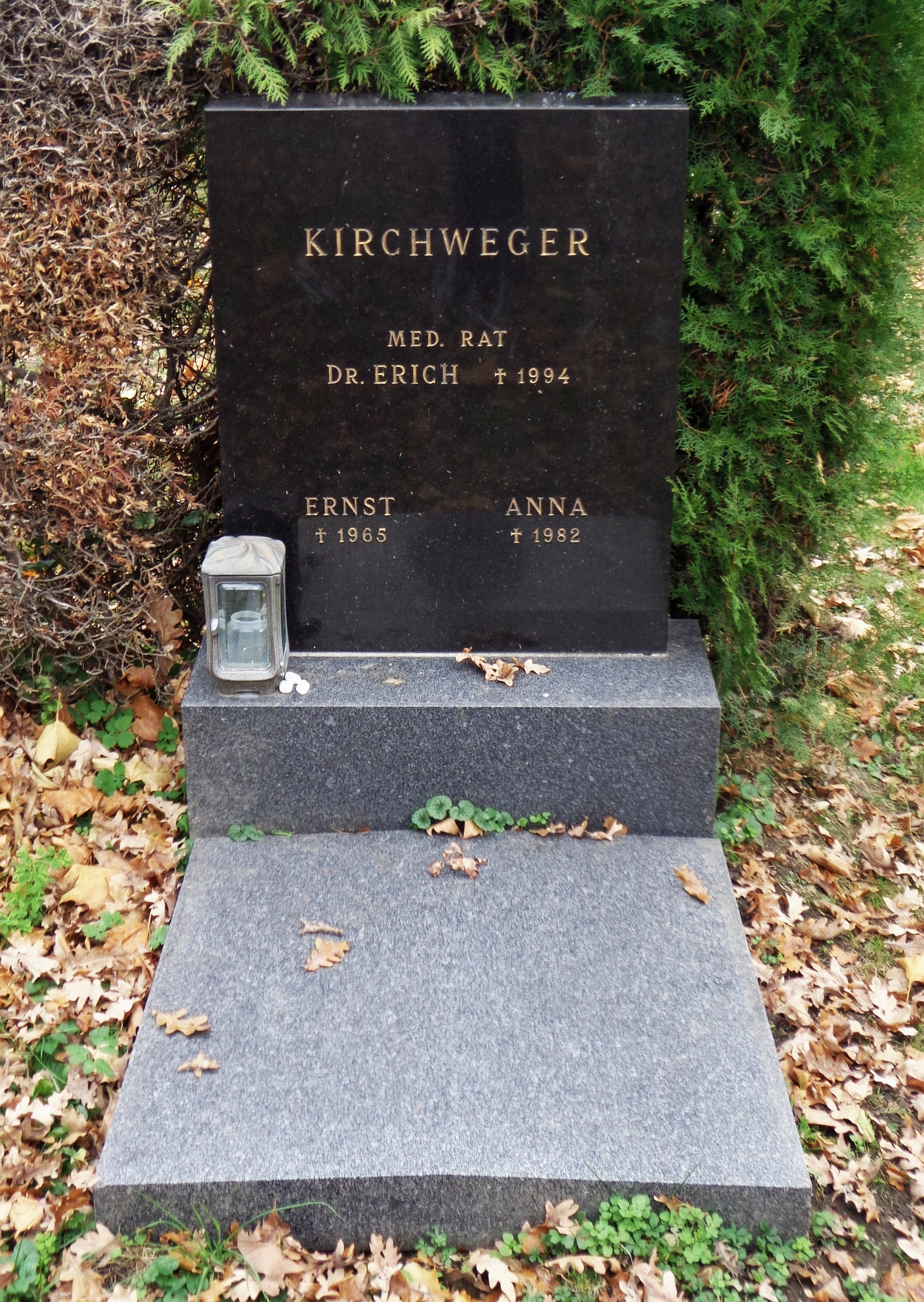 Feuerhalle Simmering - Abteilung 8 (Urnenhain, Erdgräber): ehemaliges Urnengrab von Ernst Kirchweger, dessen Asche hier bis 2005 bestattet war und dann auf den Hietzinger Friedhof überführt wurde. (Abt. 8, Ring 2, Gruppe 8, Grab 27).